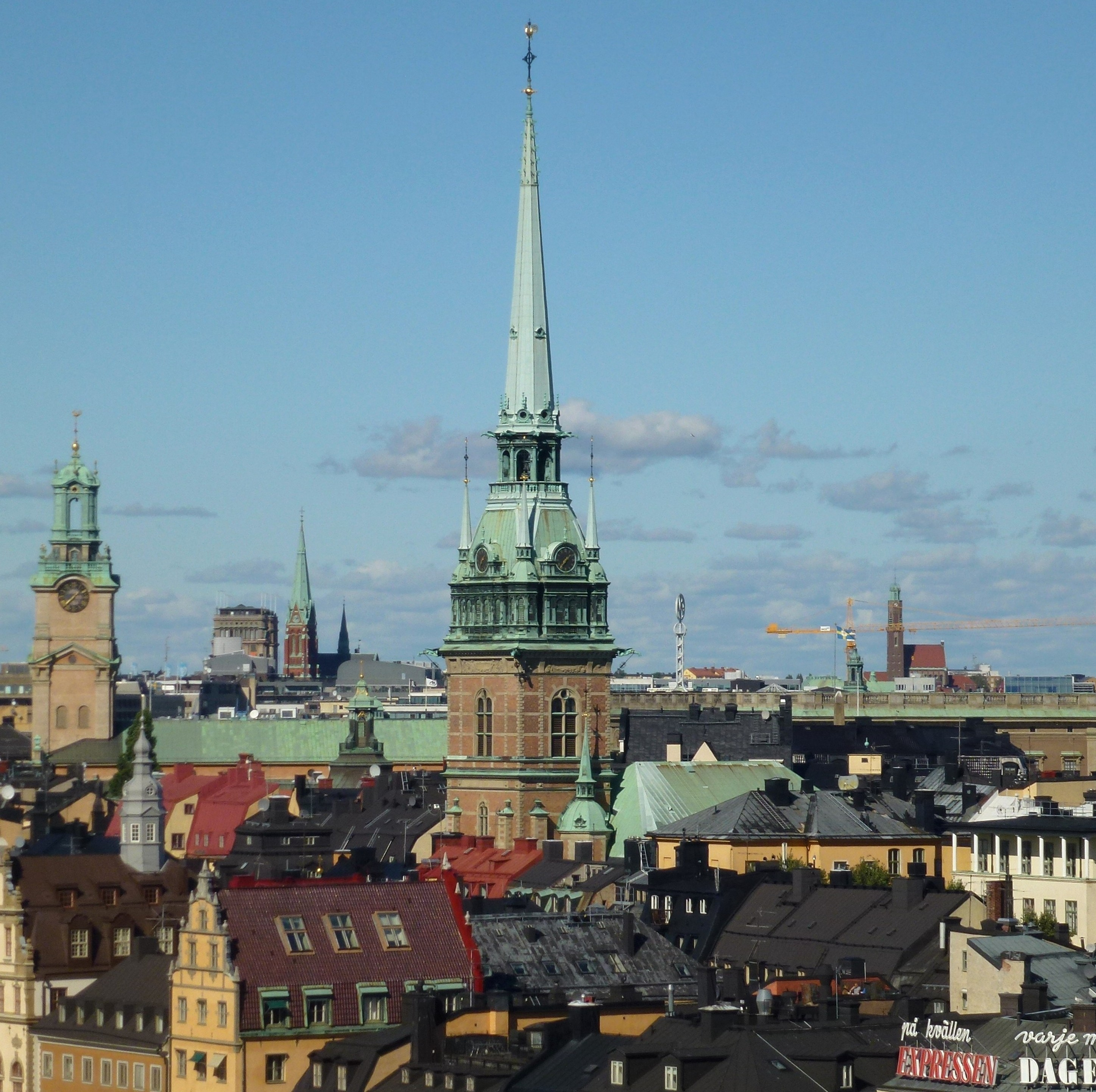 Tyska kyrkan vy från Katarinahissen